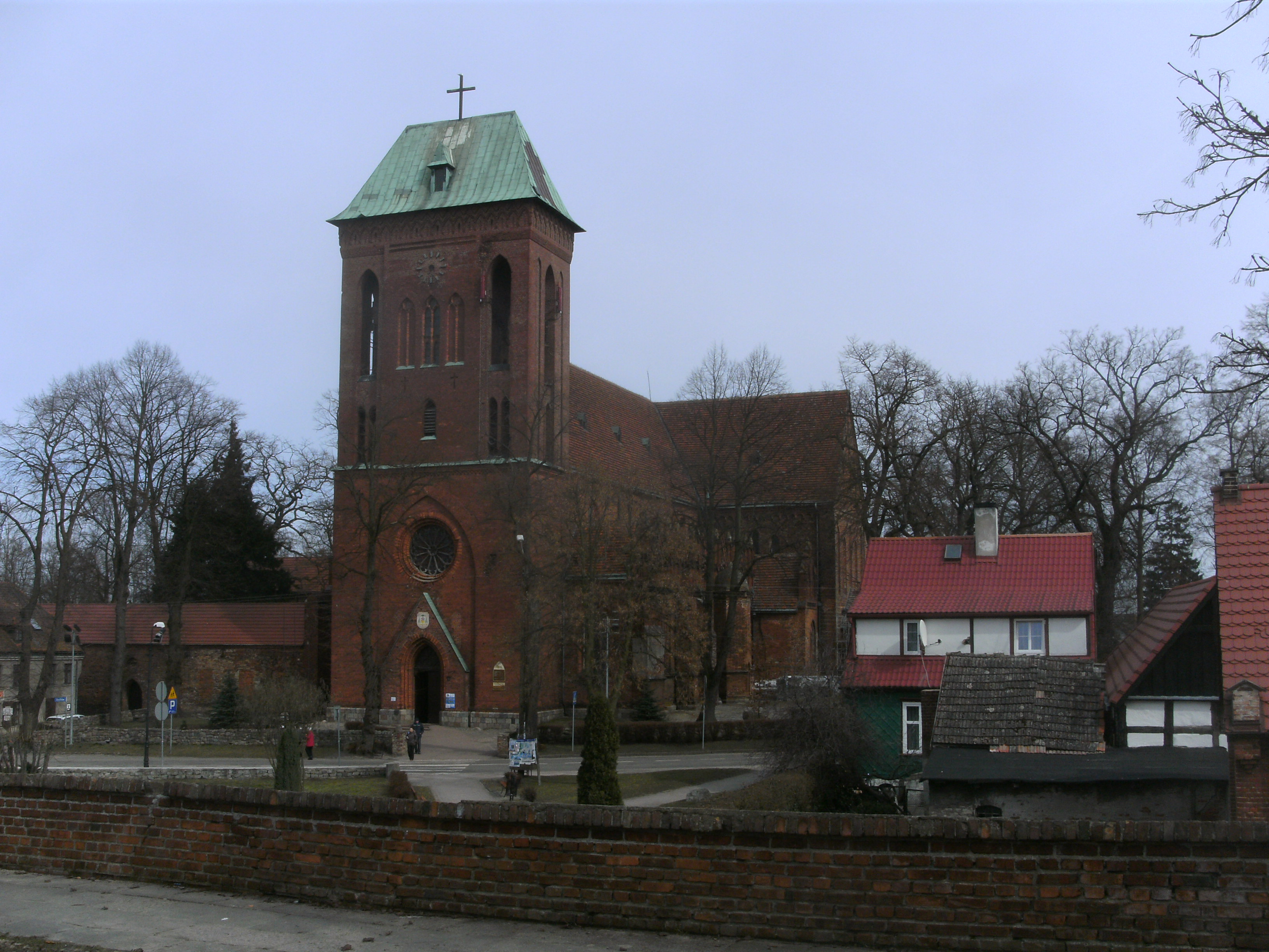 Cammin. Dom